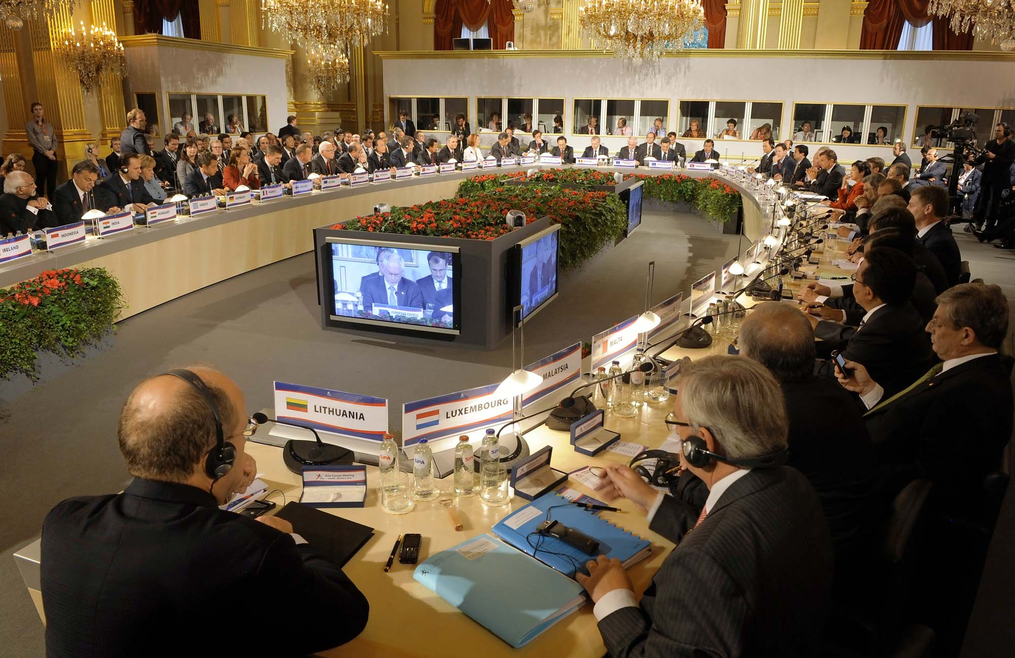 20101004 - BRUSSELS, BELGIUM : View of the opening ceremony on the first day of the eighth Asia-Europe Meeting (ASEM 8), Monday 04 October 2010, at the Royal Palace in Brussels. นายกรัฐมนตรีเข้าร่วมการประชุมผู้นำเอเซีย-ยุโรป ครั้งที่8 (ASEM8) ณ กรุงบรัสเซลส์ ประเทศเบลเยียม วันที่4 -5 ตุลาคม พ.ศ.2553 (ภาพจาก